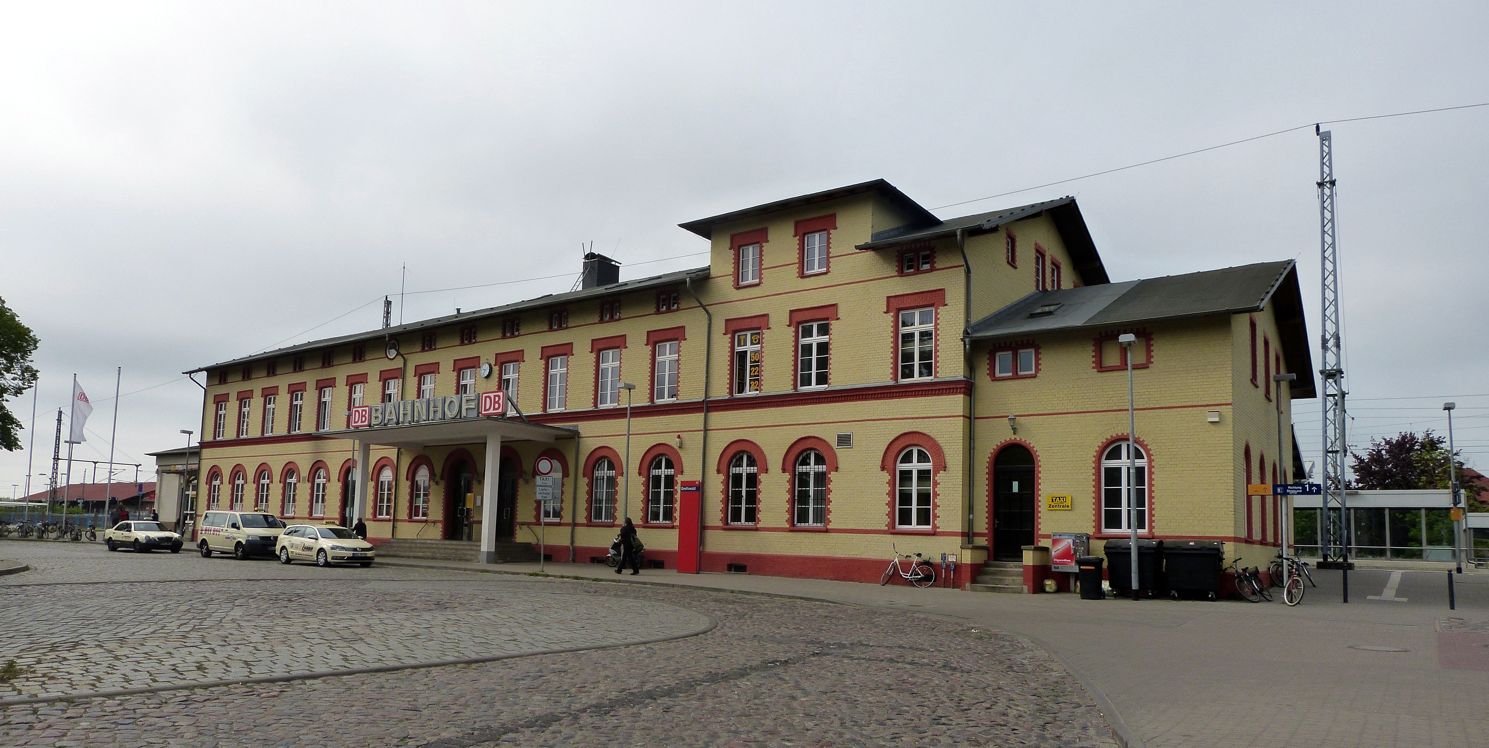 Bahnhof Greifswald, Nordostseite